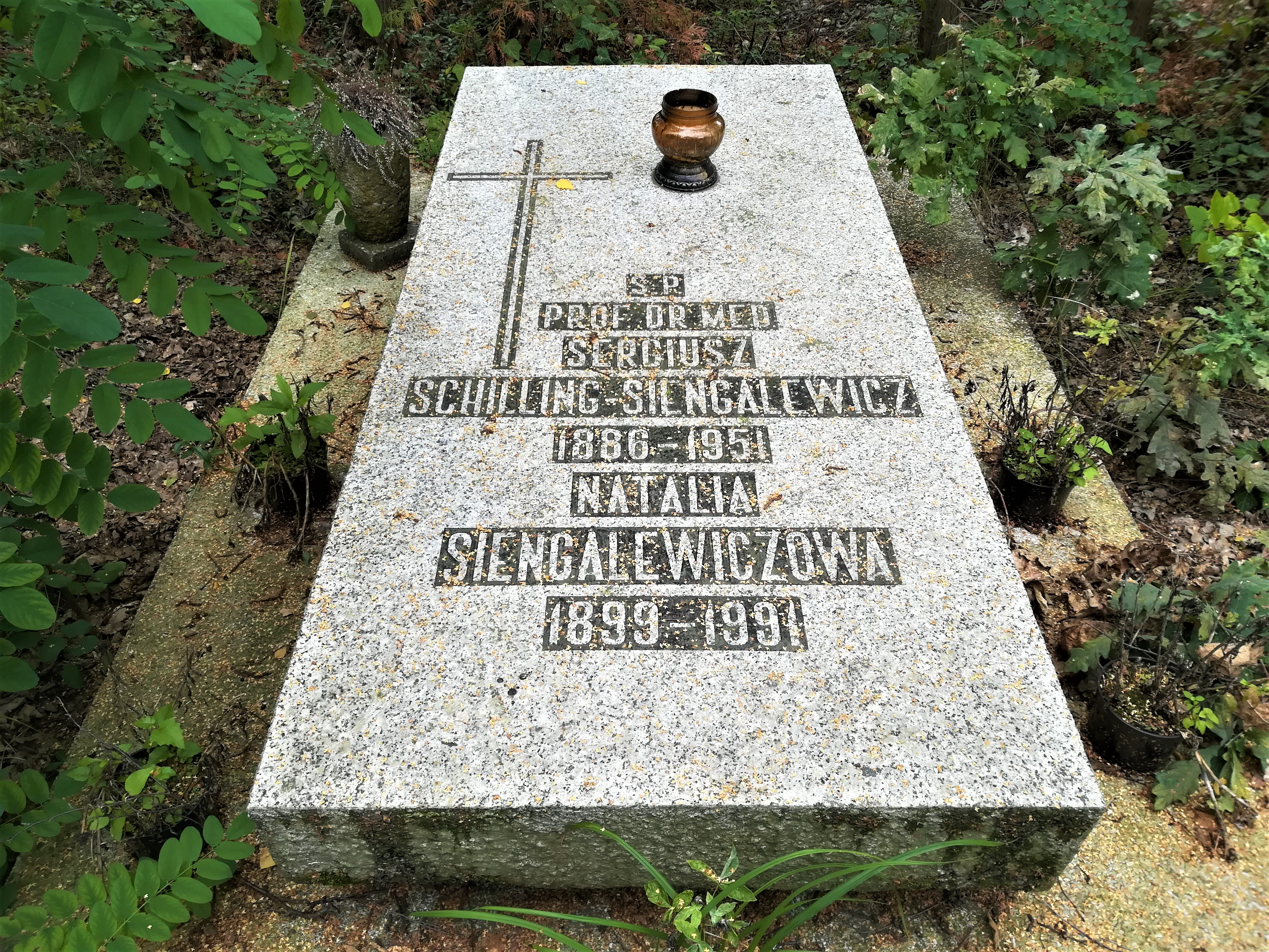 Sergiusz Schilling-Siengalewicz - grób na cm. junikowskim w Poznaniu. 2019 r.